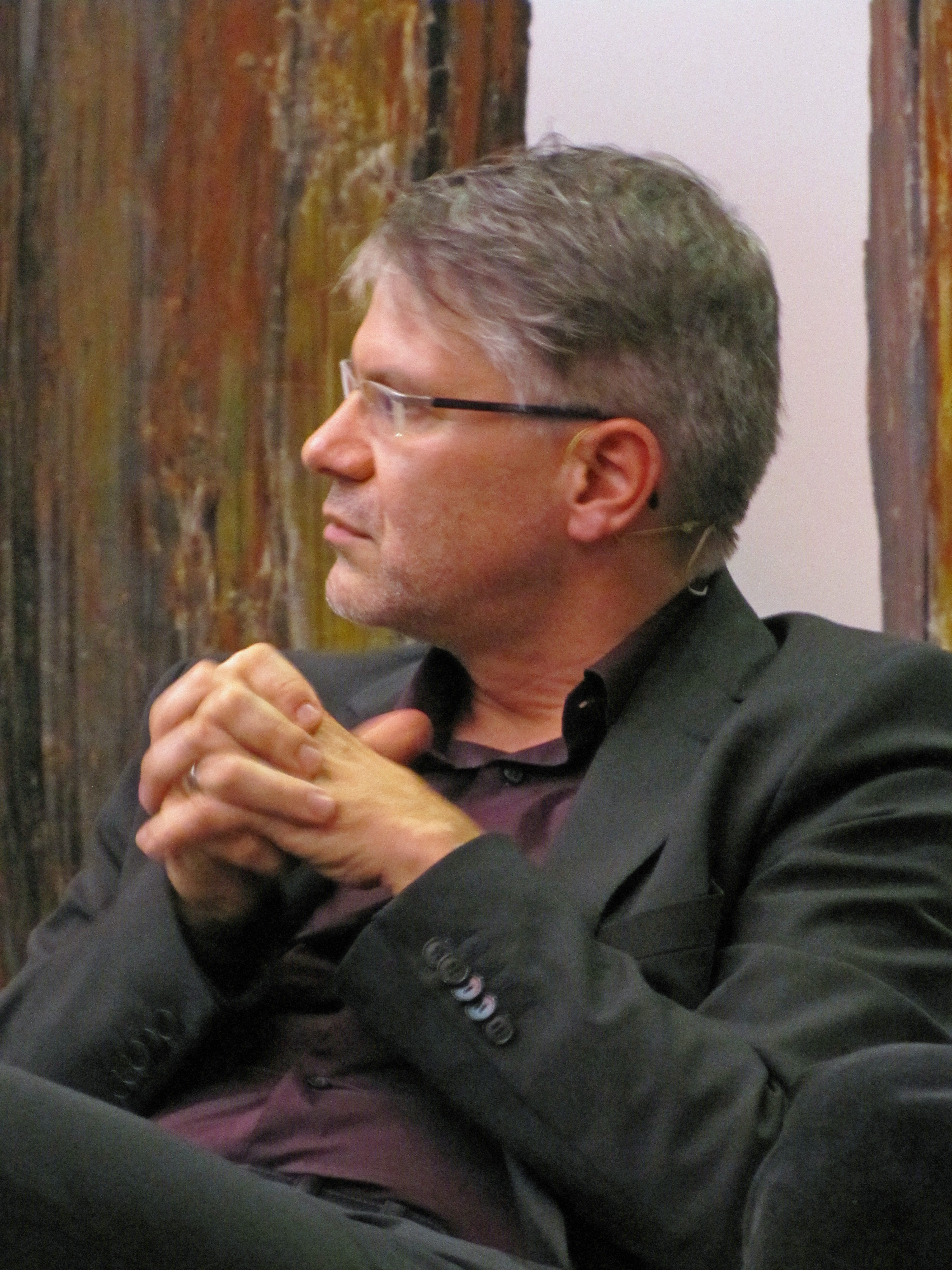 Durs Grünbein, beim Podiumsgespräch "Der Hirnforscher Georg Büchner", 2012 im Senckenberg-Museum in Frankfurt am Main.